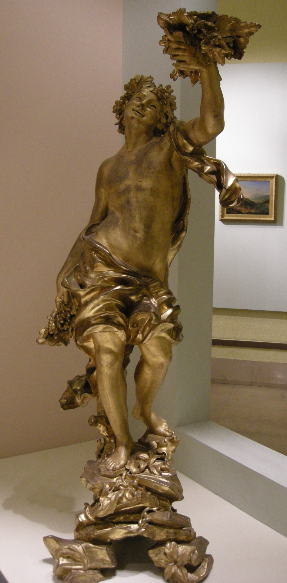 Filippo parodi, angelo reggicandelabro, 1667-77